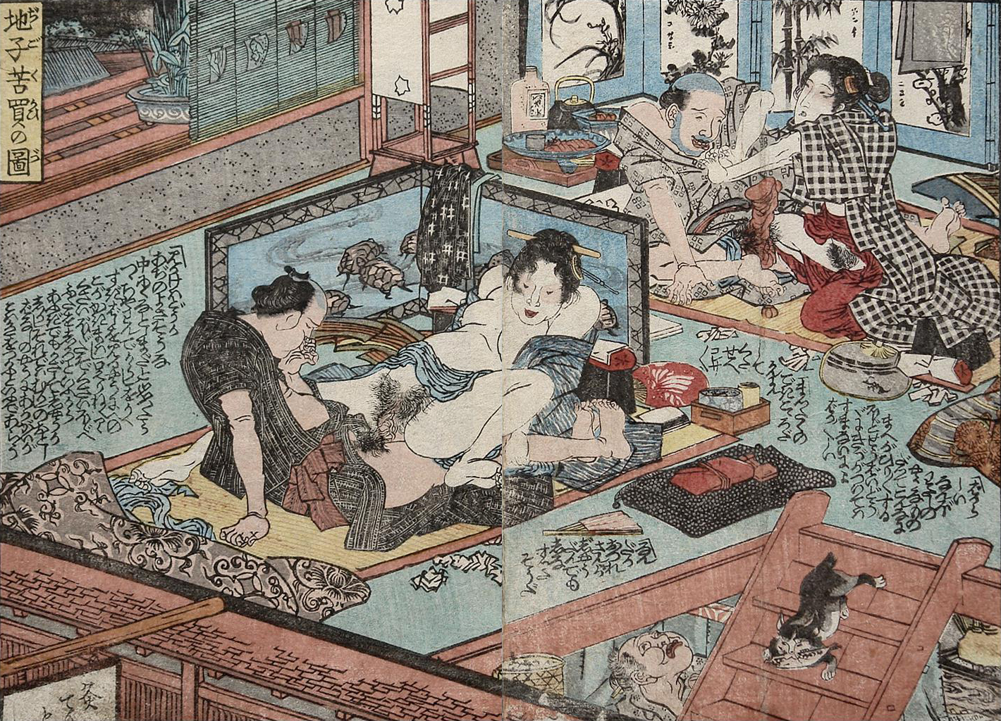 Shunga de Kuniyoshi que muestra actividad en varios pisos al mismo tiempo. El gato de la esquina inferior derecha es su firma oculta.